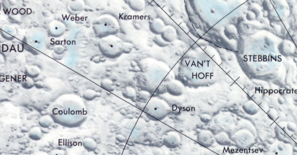 Cráter lunar Sarton. Localización. (Lunar Chart LPC1. Second Edition)